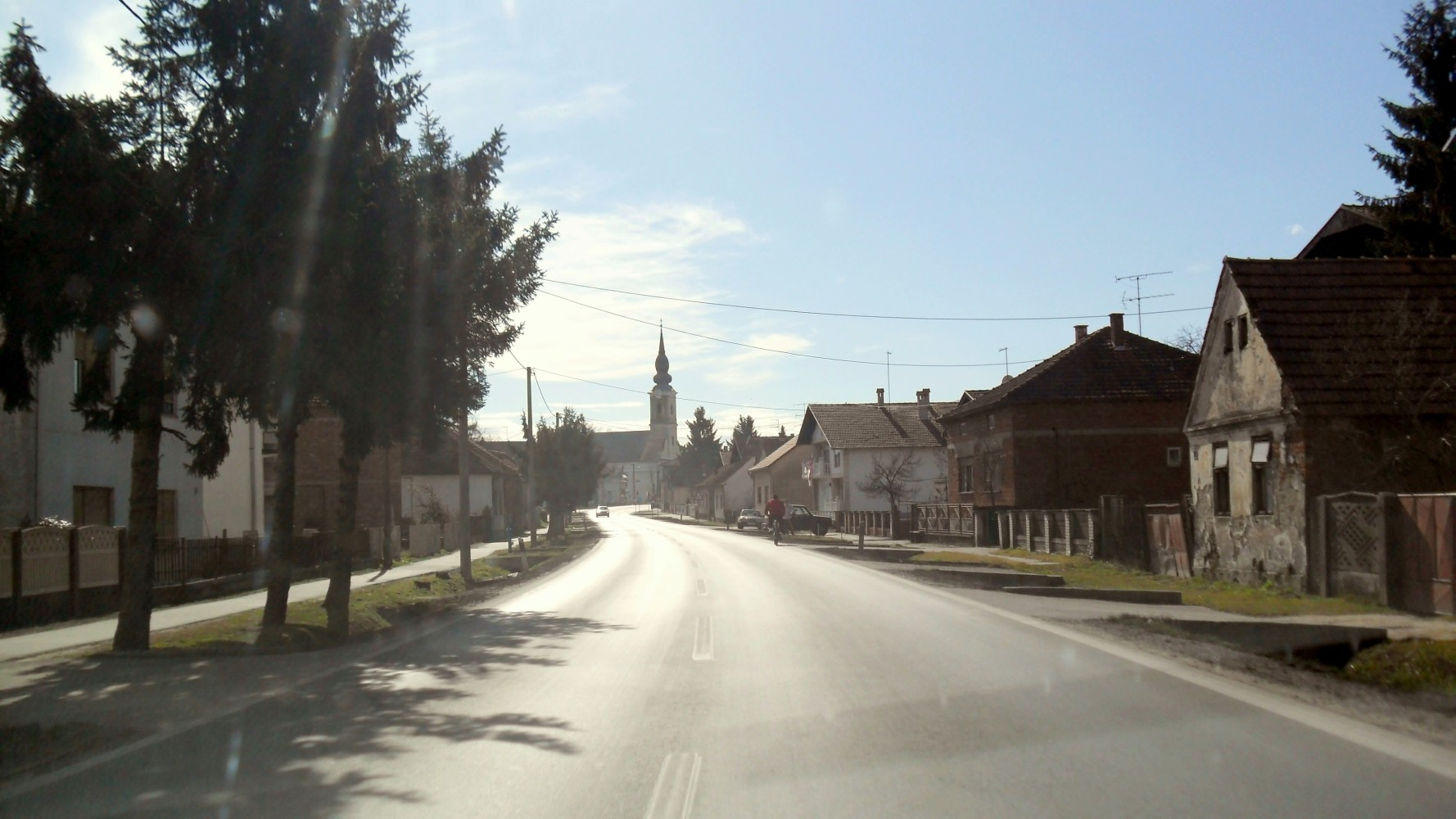 14.03.2011. _ Pitomača